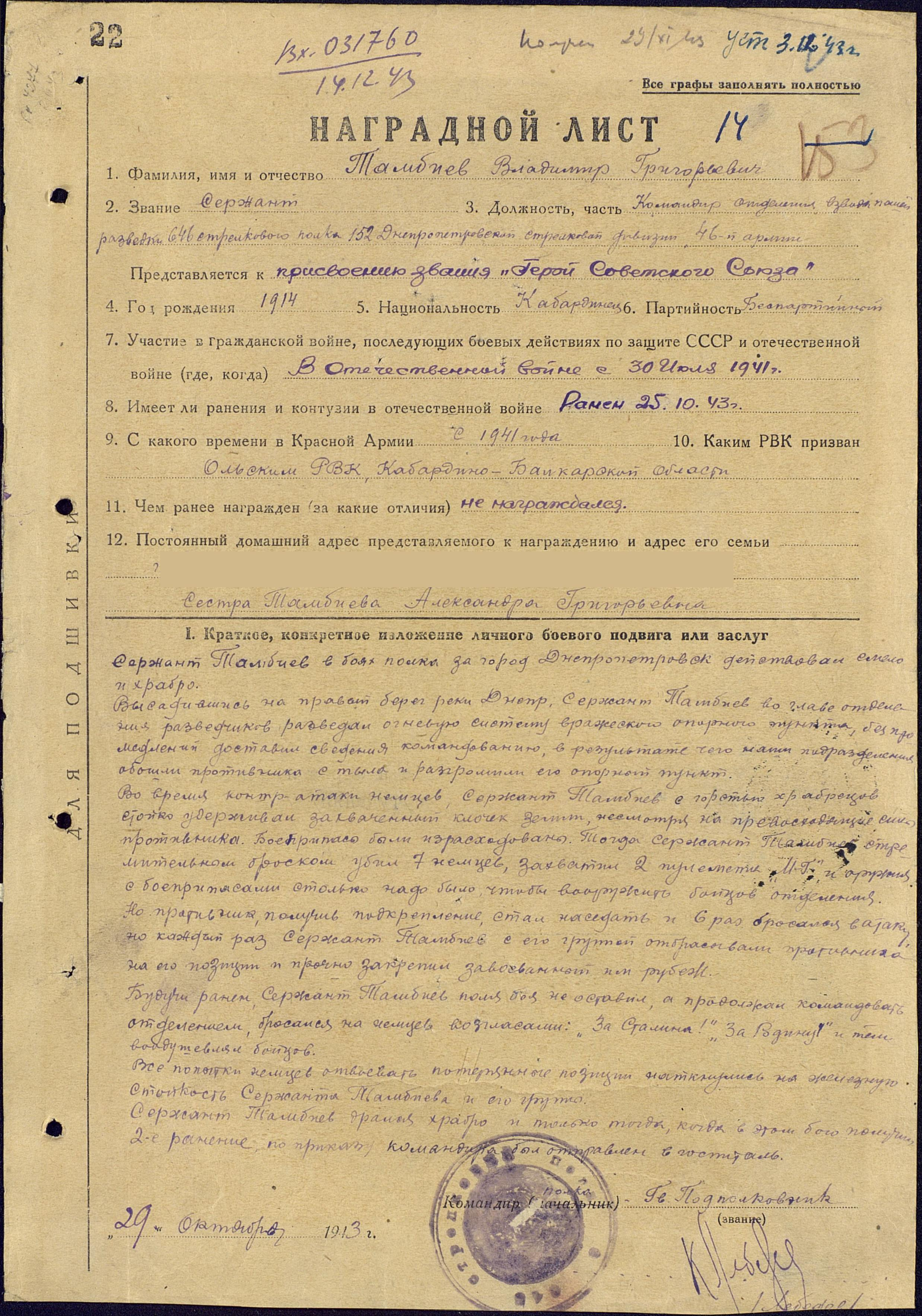 Тамбиев В.Г. наградной лист представления к званию Героя Советского Союза